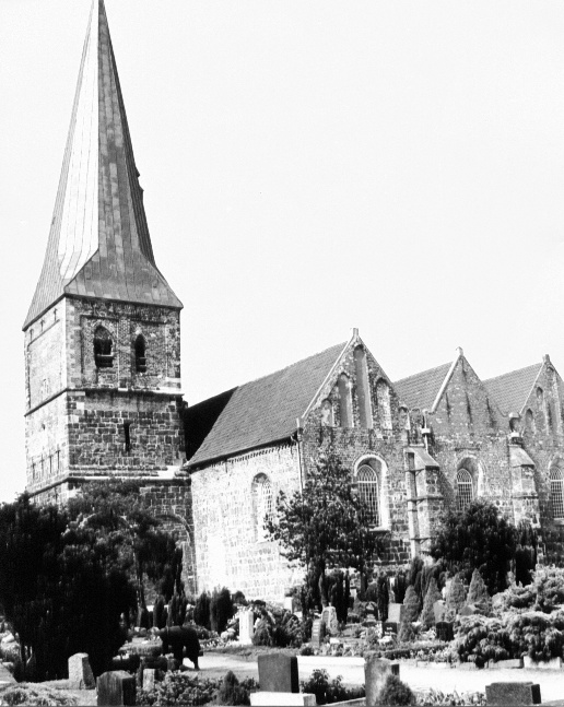 De St.-Ägidius-Kark in Berne